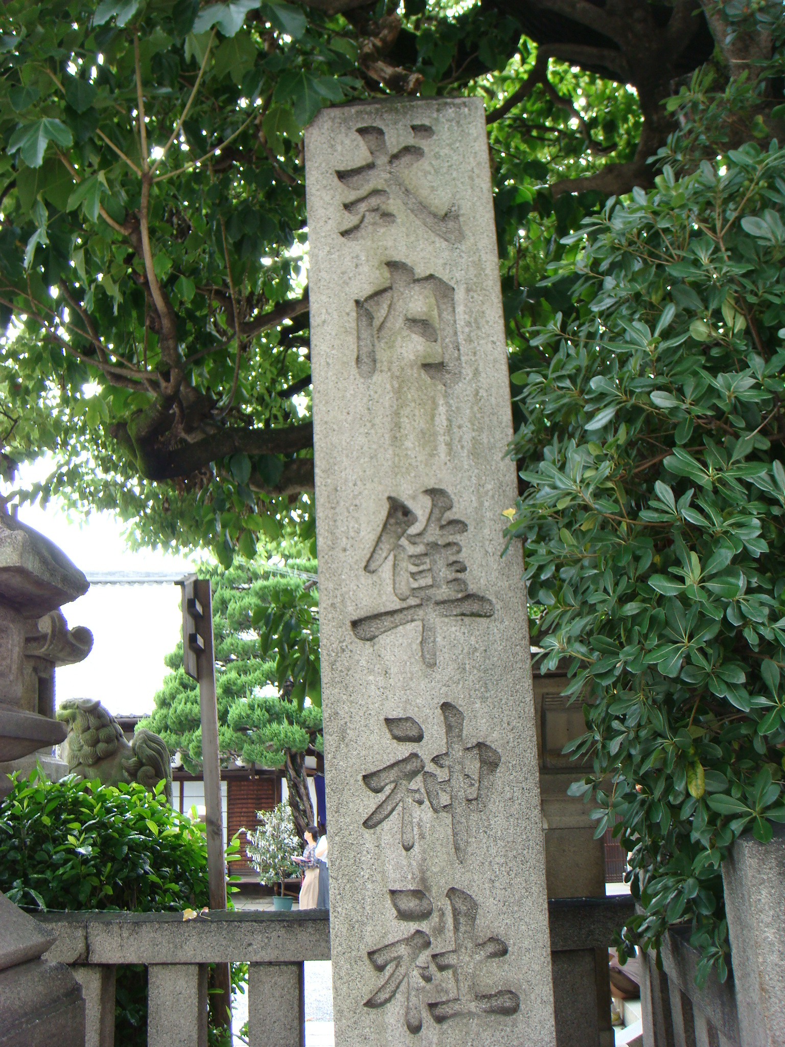 京都の隼神社